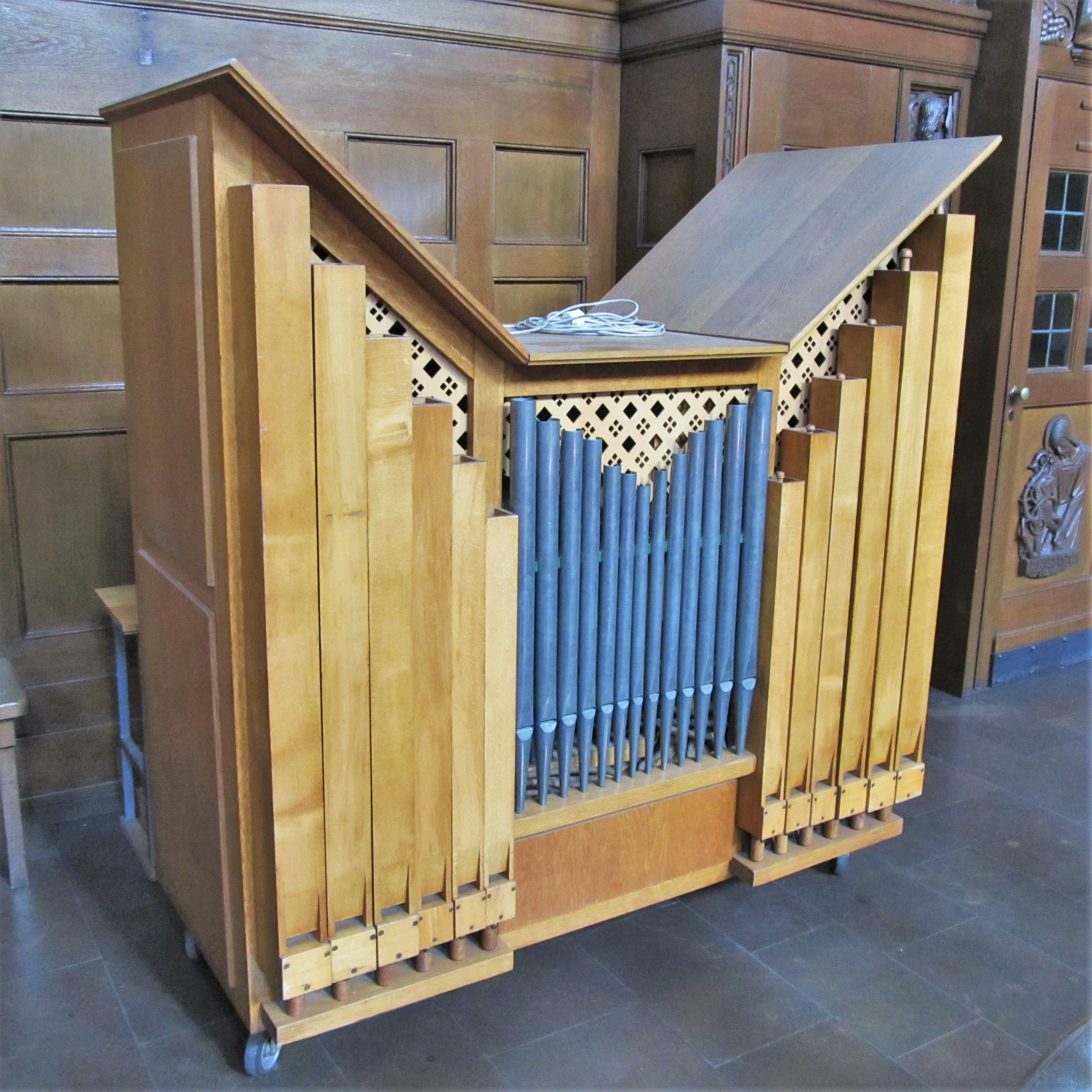 Die Chororgel der St. Michaelskirche (Homburg, Saarland)